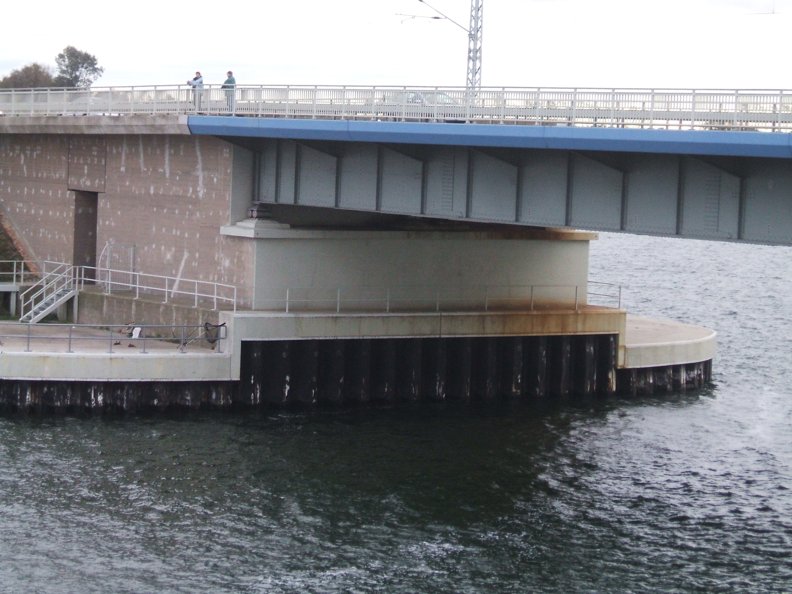 Rügendammbrücke